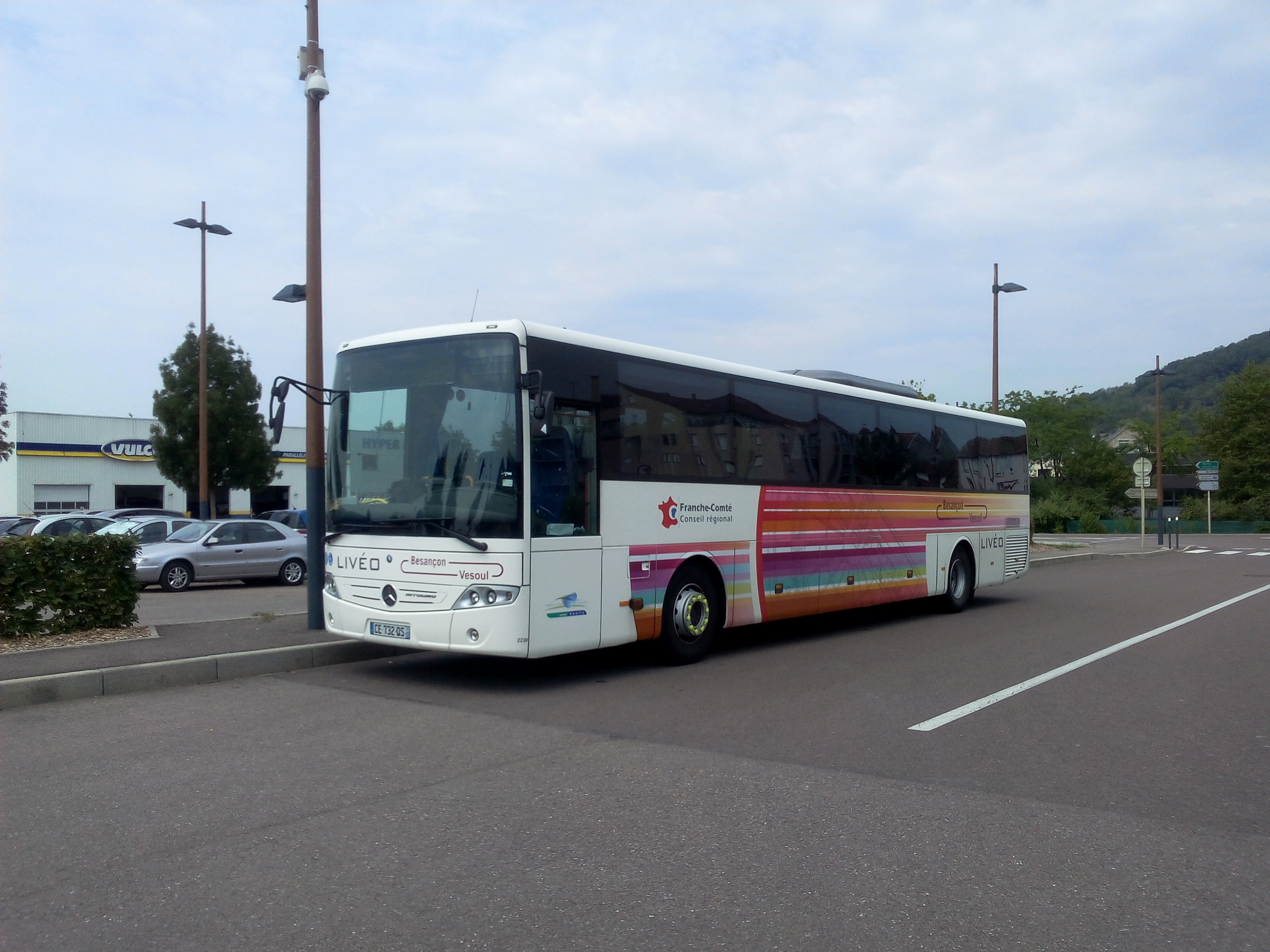 Autocar de la ligne Besançon - Vesoul